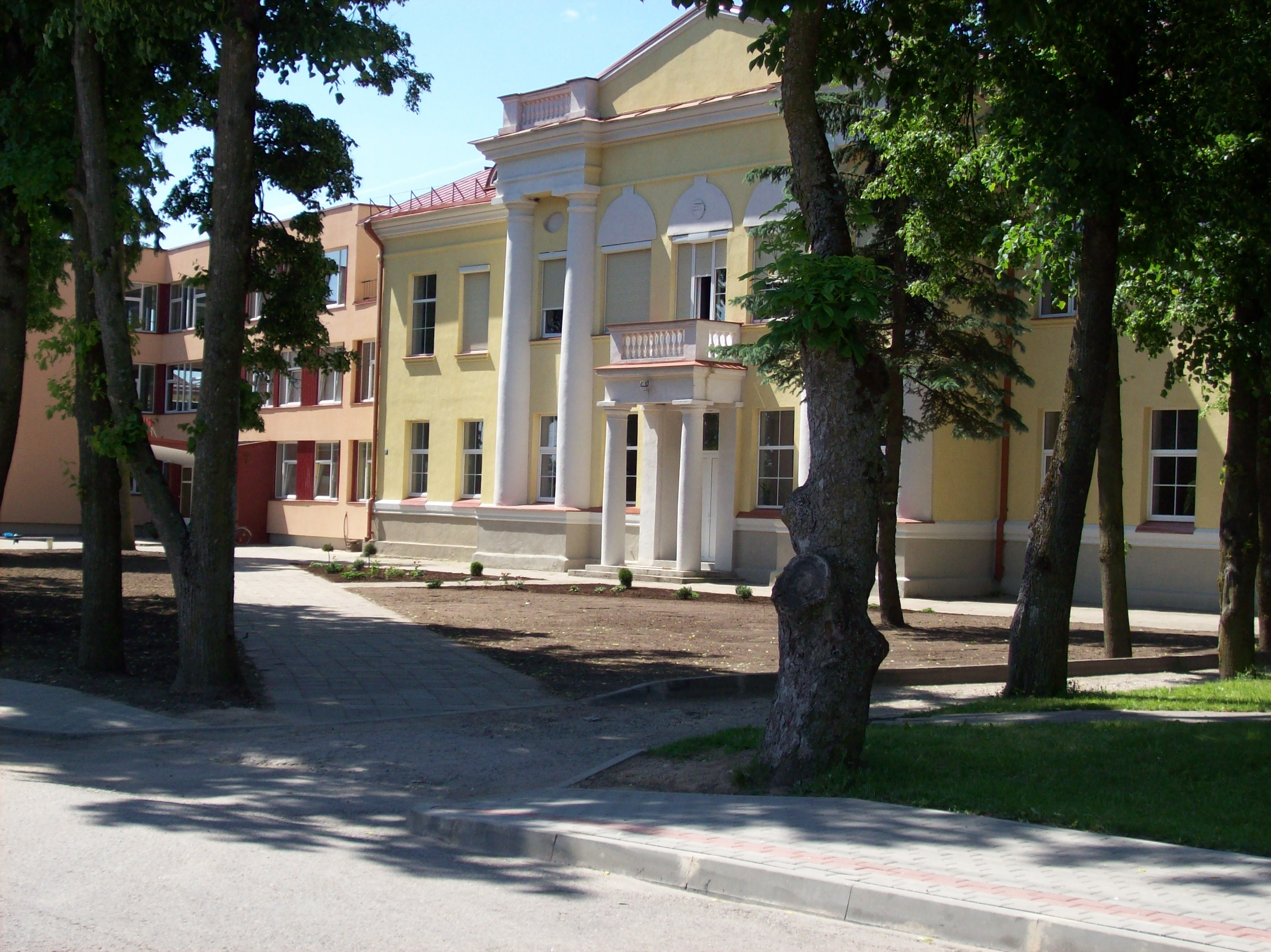 Ramygalos gimnazija